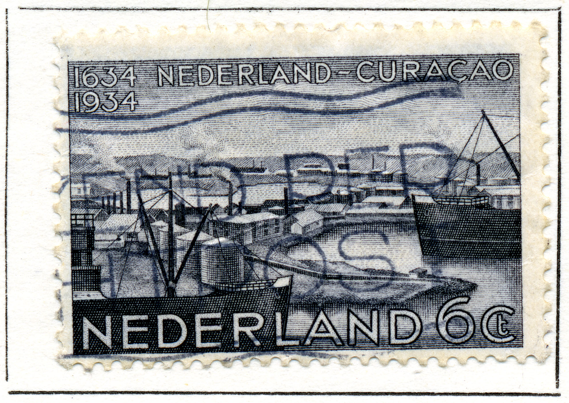 Herdenkingszegel, Haven Willemstad-Curaçao met olietanks (1934). NVPH nr 267. Ontwerper Aart van Dobbenburgh